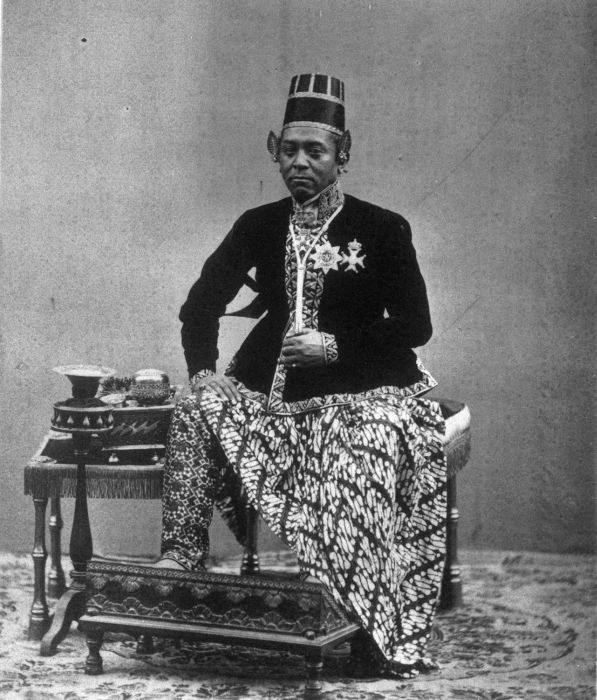 Foto. Portret van de Sultan van Djogjakarta Hamengkoe Boewono VI (1855-1877).